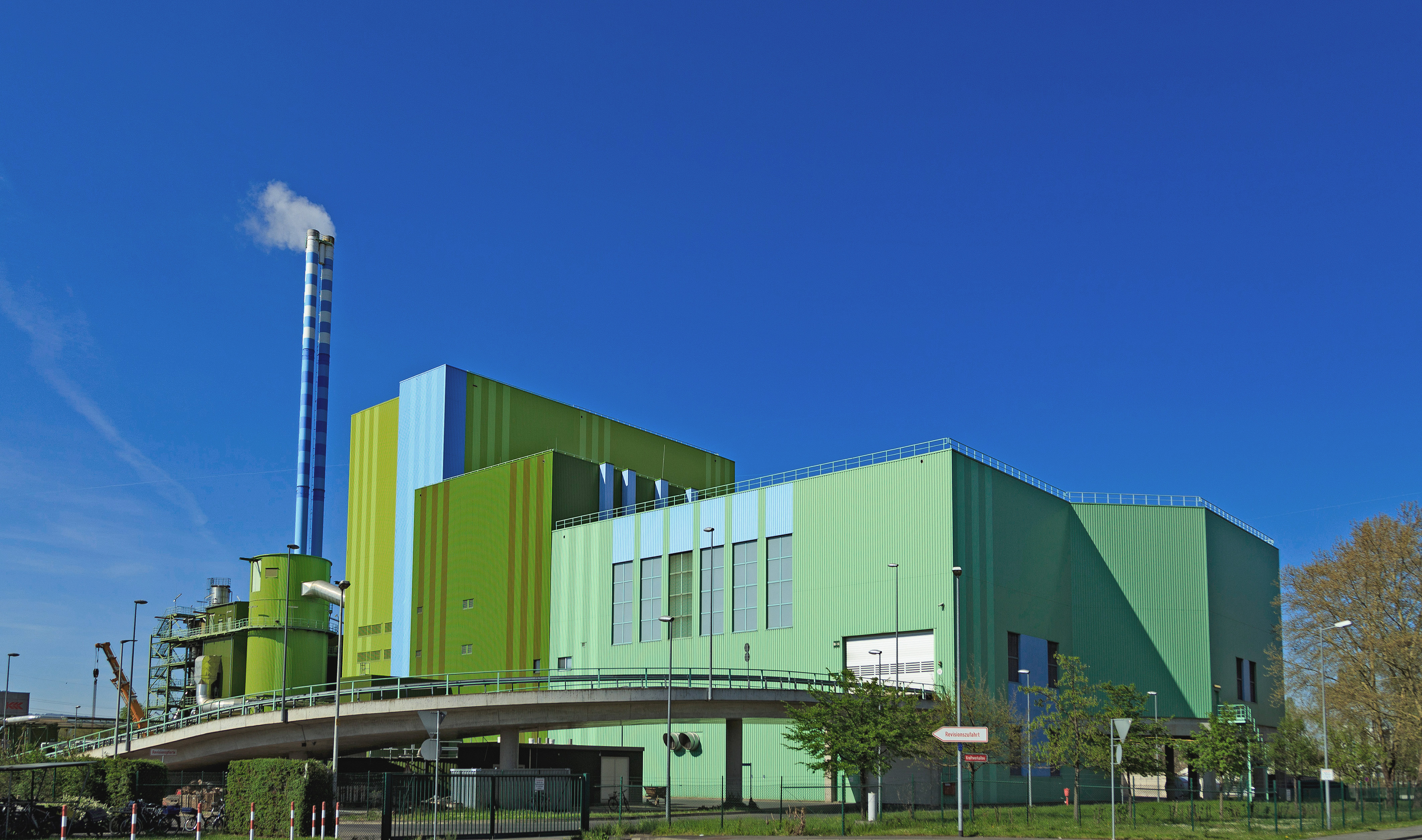 Außenansicht des Mainzer Müllheizkraftwerks auf der Ingelheimer Aue in Mainz